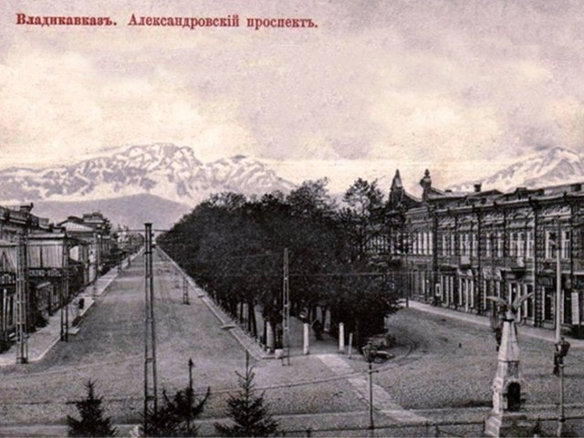 Александровский проспект в дореволюционном Владикавказе